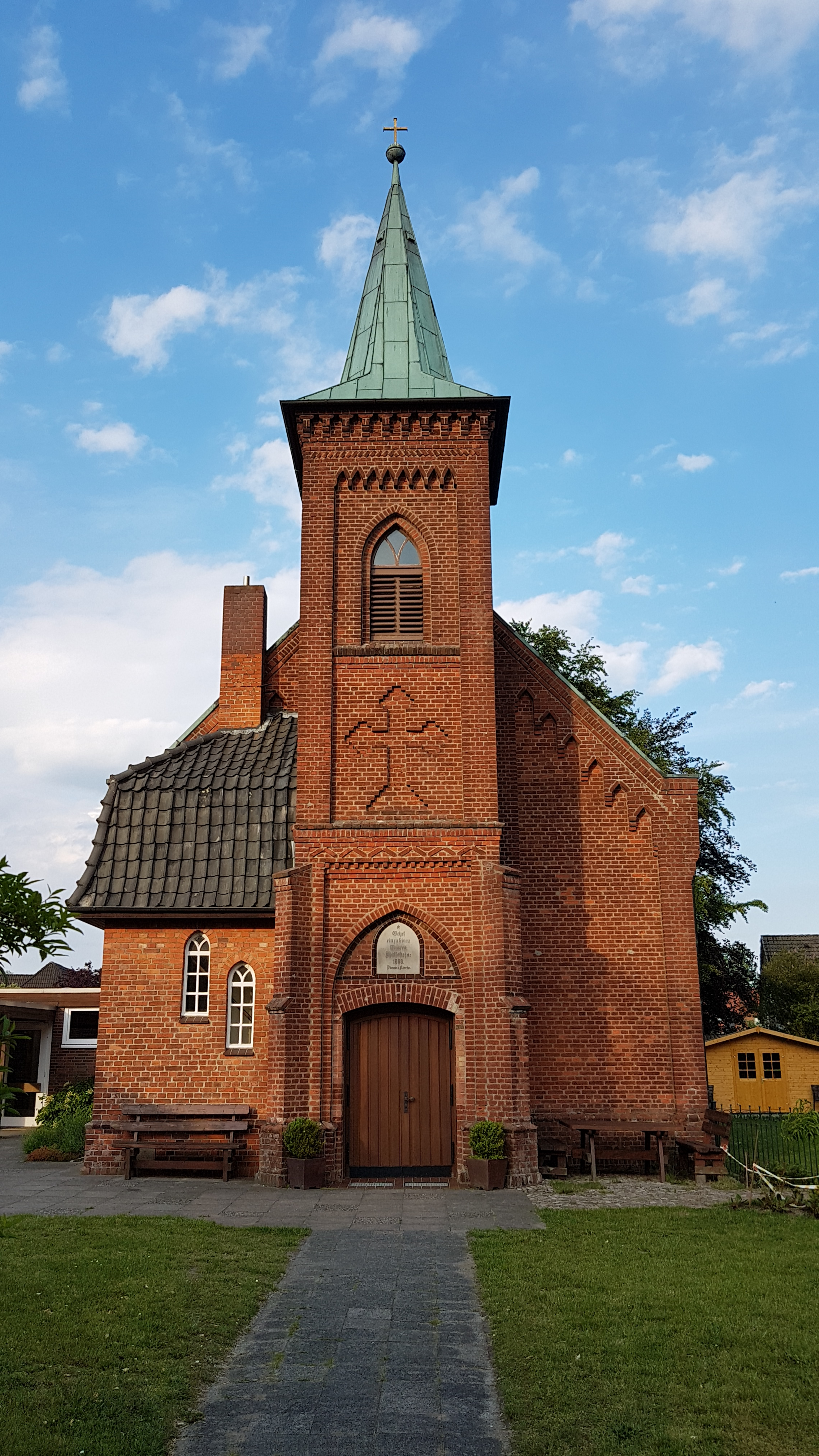 Die Turmfront der Zionskirche Soltau